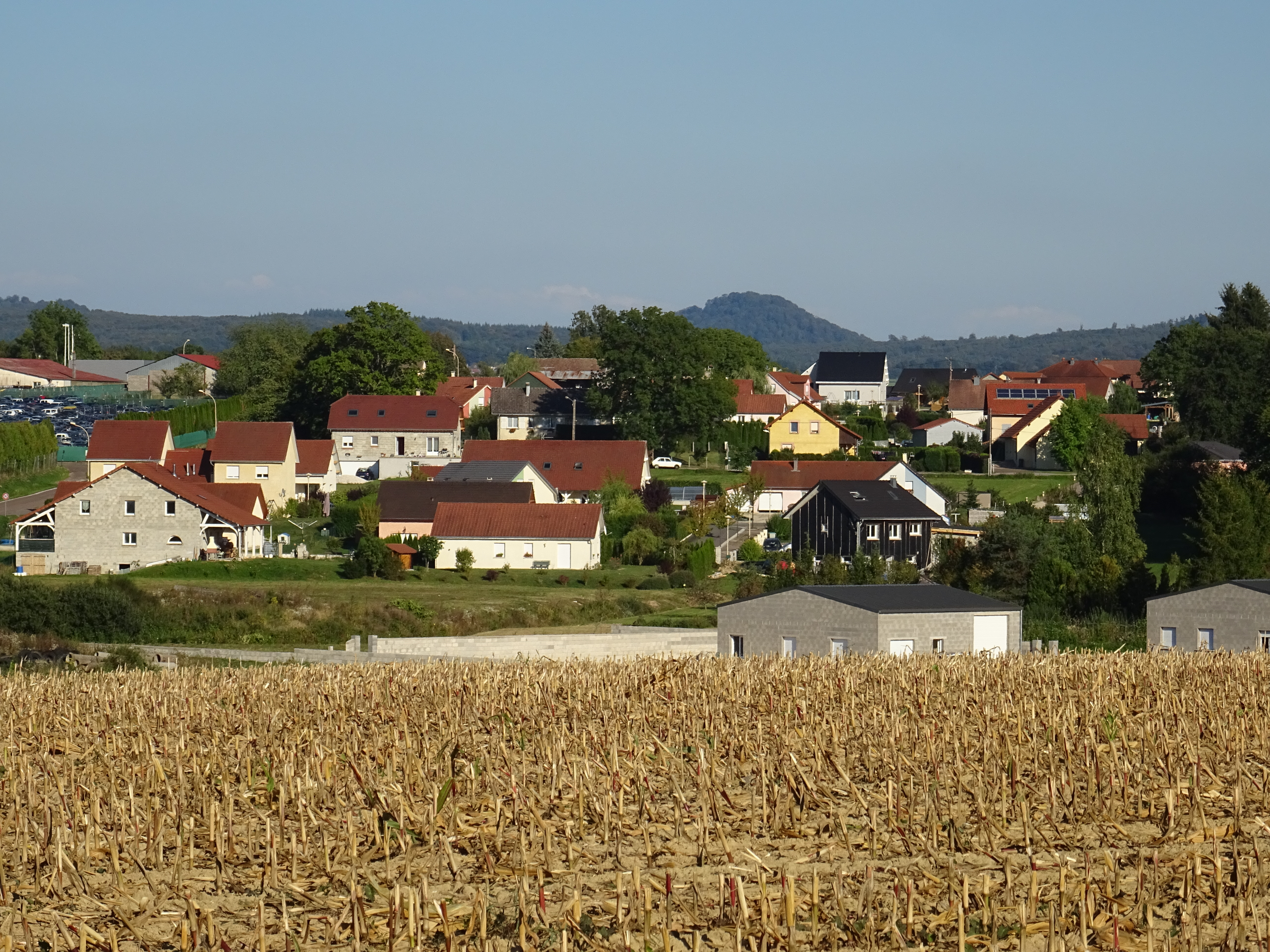 Lotissement à Frotey-lès-Lure.